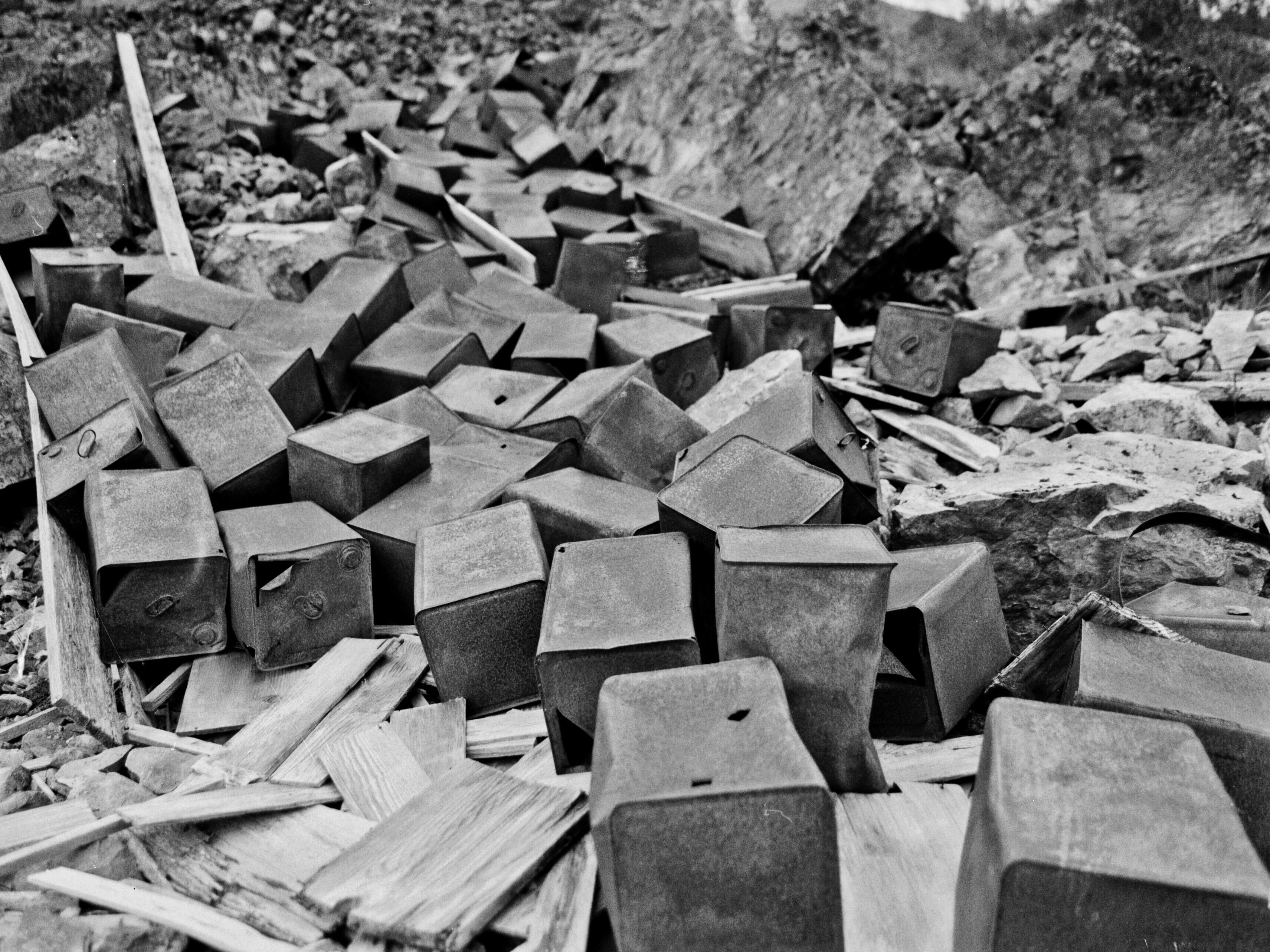 1/750 F4.5 45mm